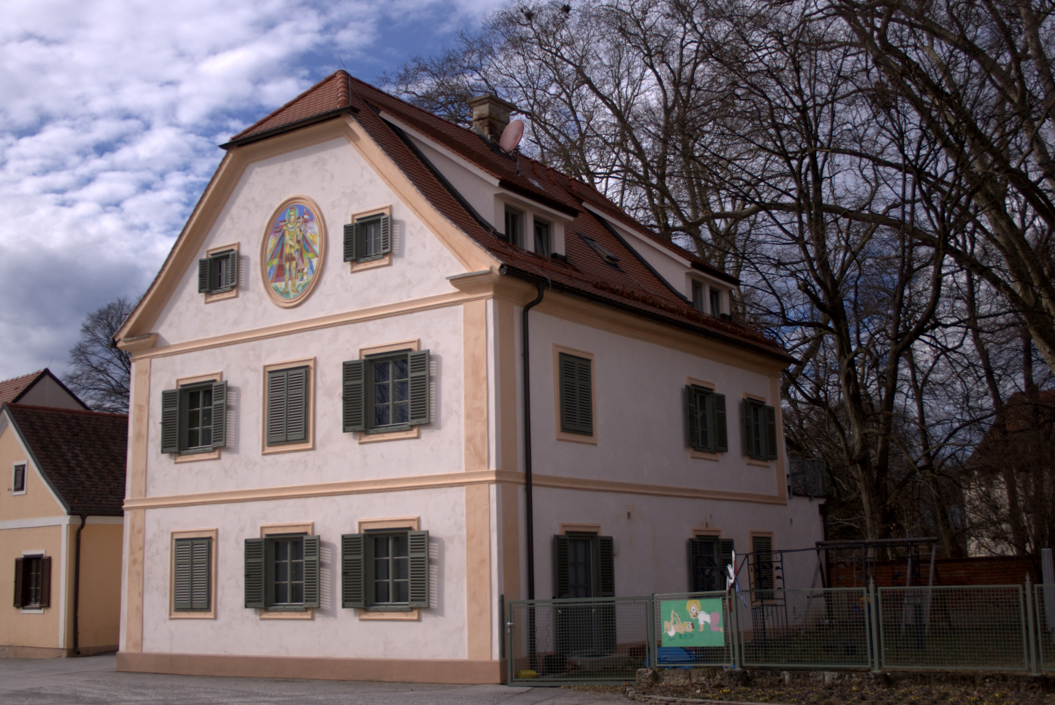 Neudau Wohnhaus, ehem. Gemeindehaus